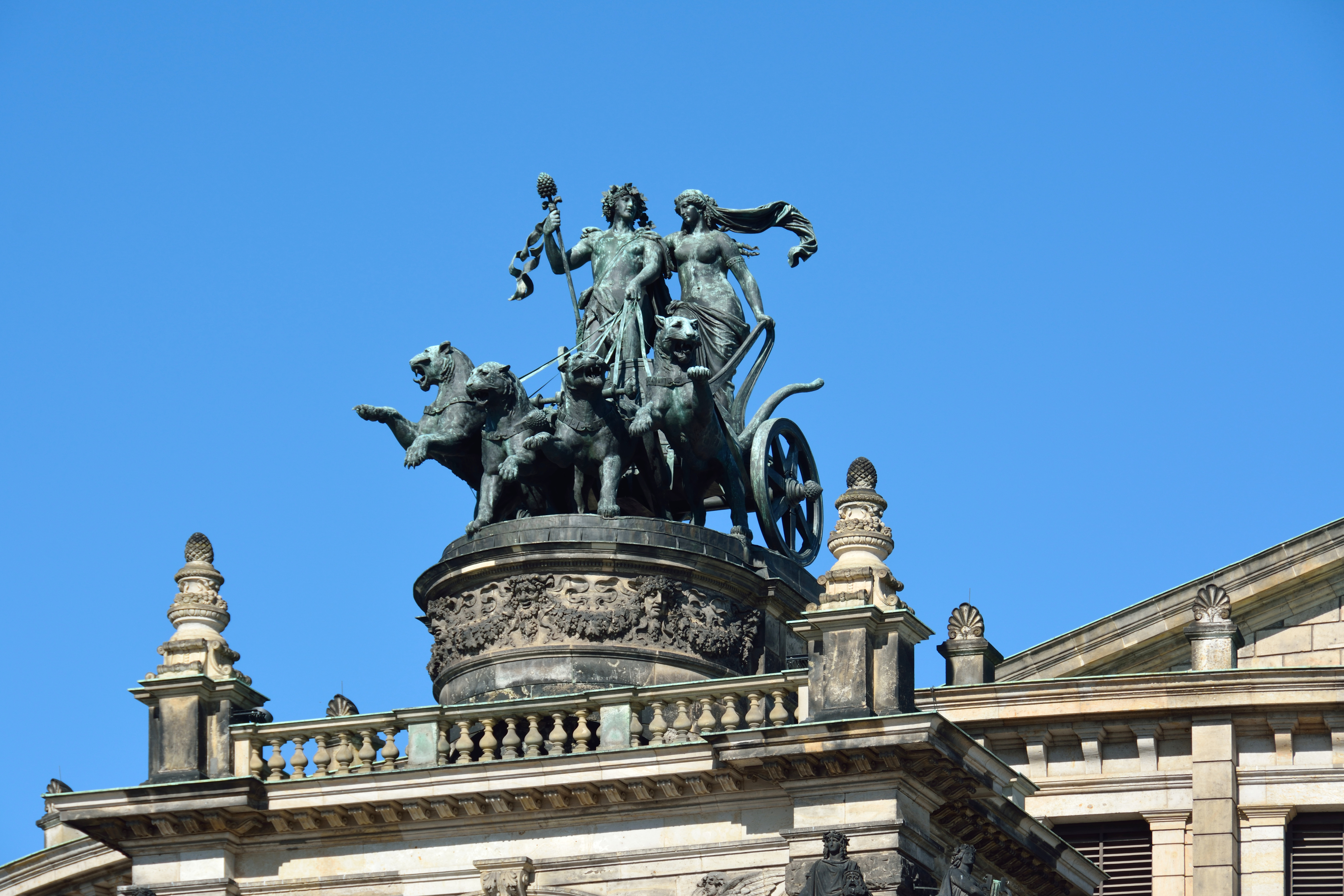 Impressionen aus Dresden am Vortag der Wikicon 2015